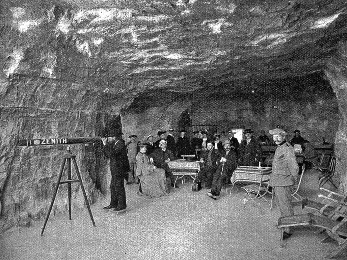 1903, Das Felsenrestaurant bei der Jungfraubahn Station Eigerwand. Foto Gebrüder Bruno Wehrli, Kilchberg.